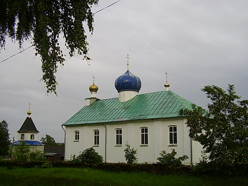 Пляшэвічы. Свята-Троіцкая царква